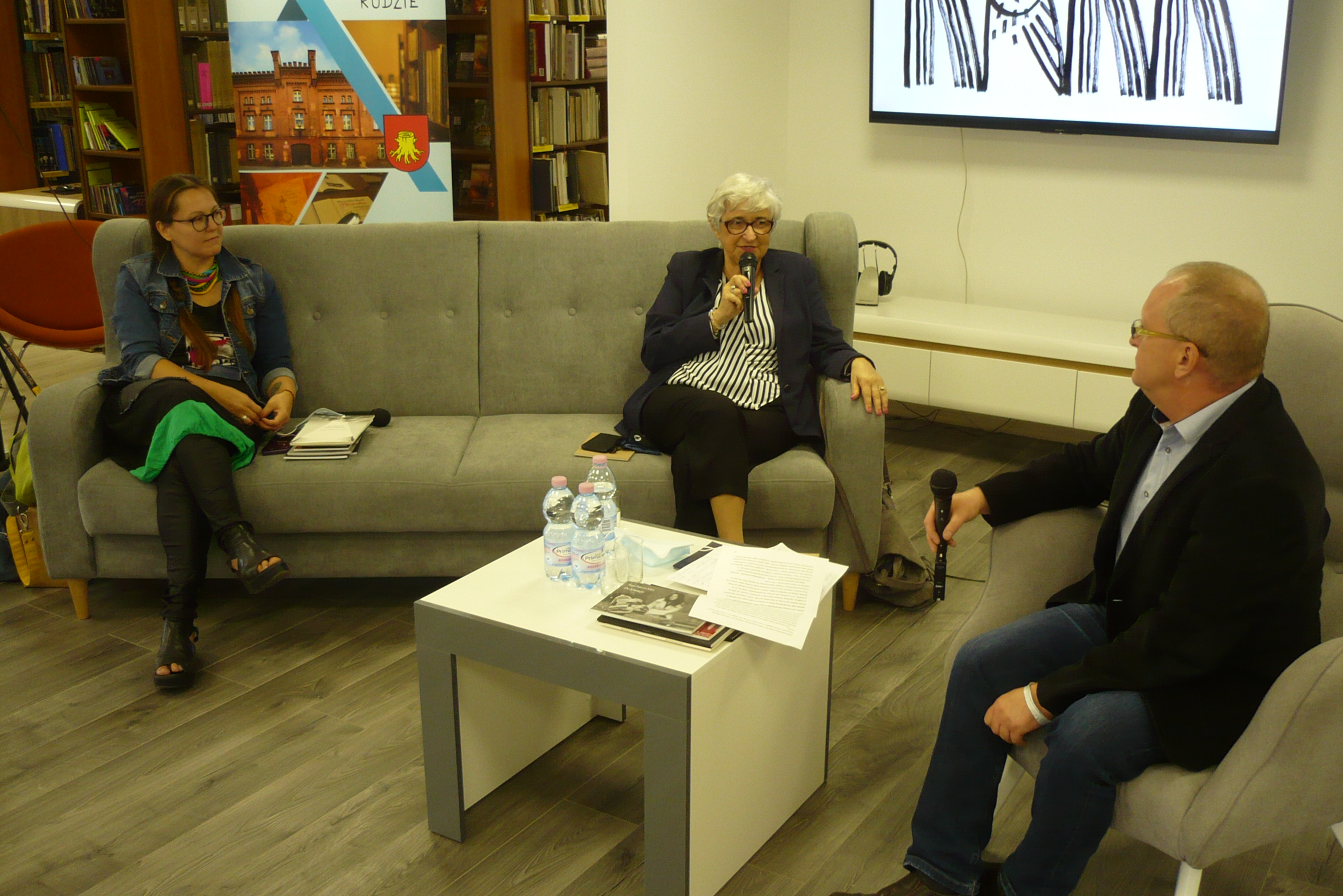 Elżbieta Lipińska, VI Festiwal Góry Literatury, Nowa Ruda, 13.07.2020